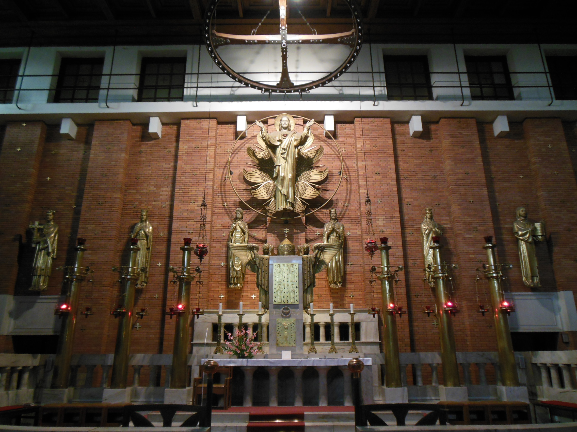 Praha-Vinohrady. Náměstí Jiřího z Poděbrad, hlavní oltář kostela Nejsvětějšího Srdce Páně.